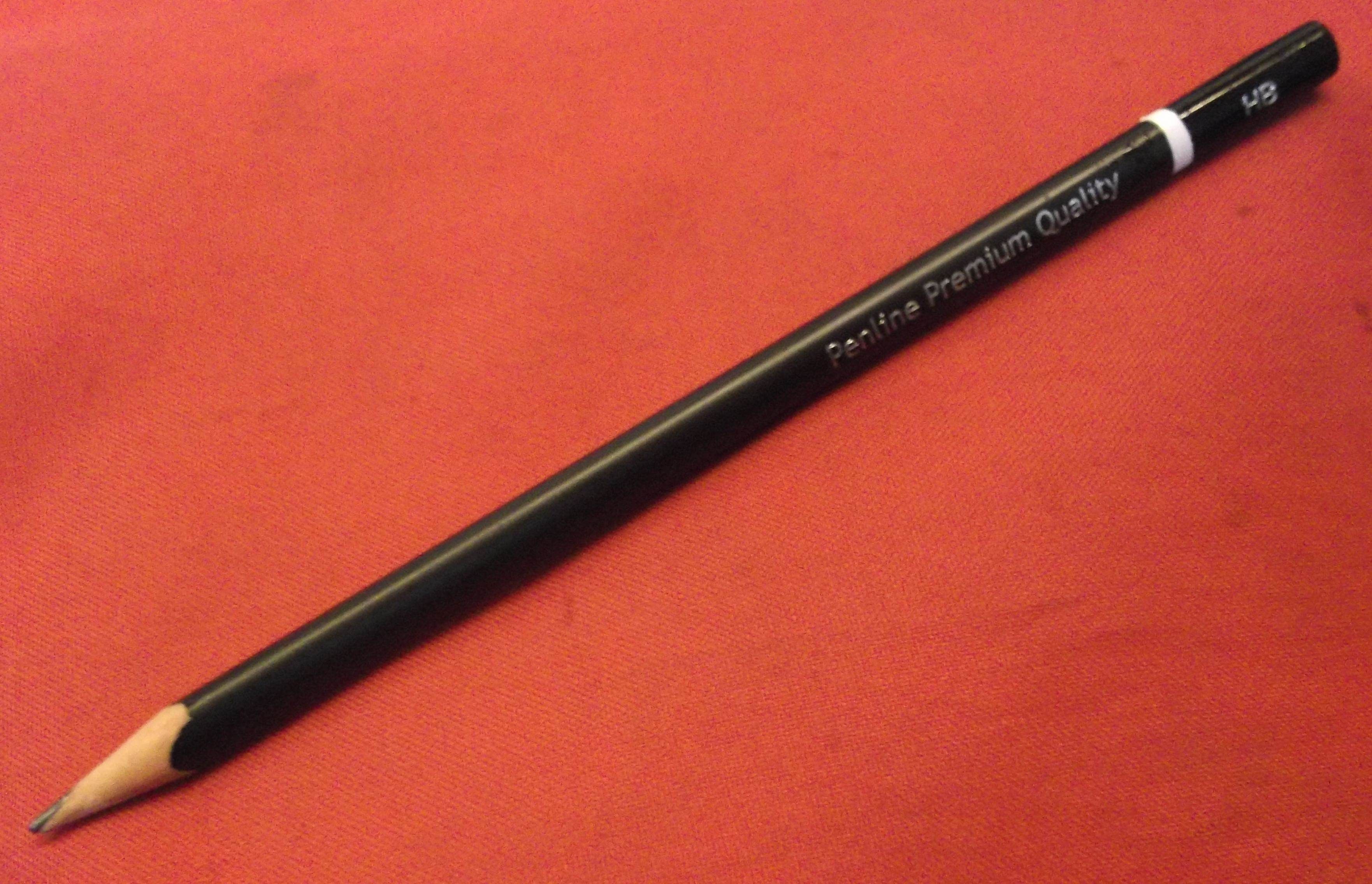 2014-01-16-Hittegods